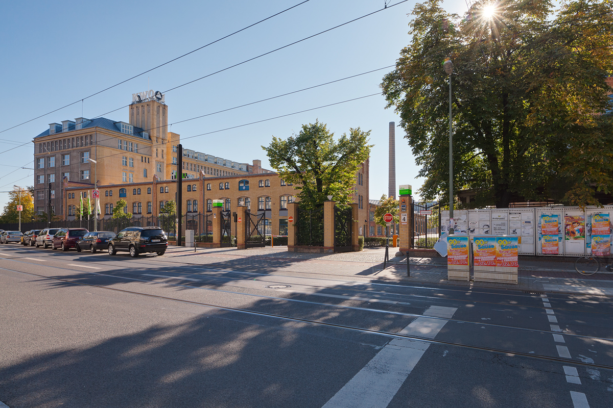 HTW Berlin, Eingang zum Campus Wilhelminenhof